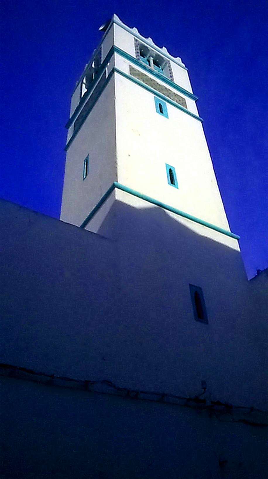 Sidi El Béchir , Tunis سيدي البشير ، تونس